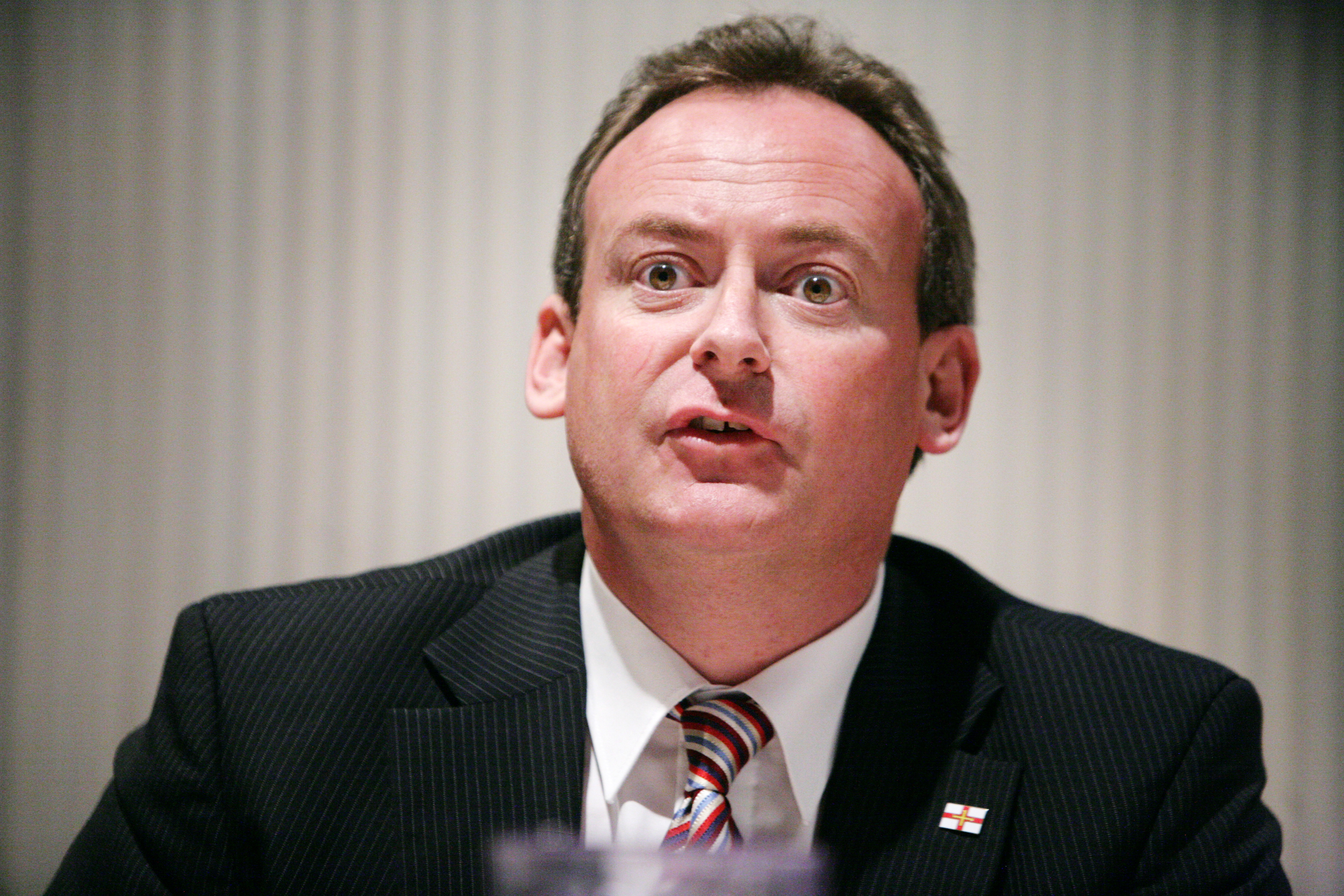 Guernseys finansminister Lyndon Trott vid Nordiska rådets session i Helsingfors 2008-10-28.